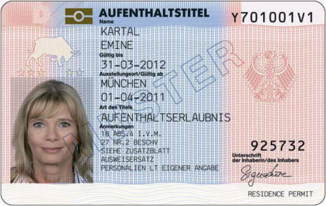 Vorderseite des Musters eines elektronischen Aufenthaltstitels der Emine Kartal mit dem Foto der Erika Mustermann